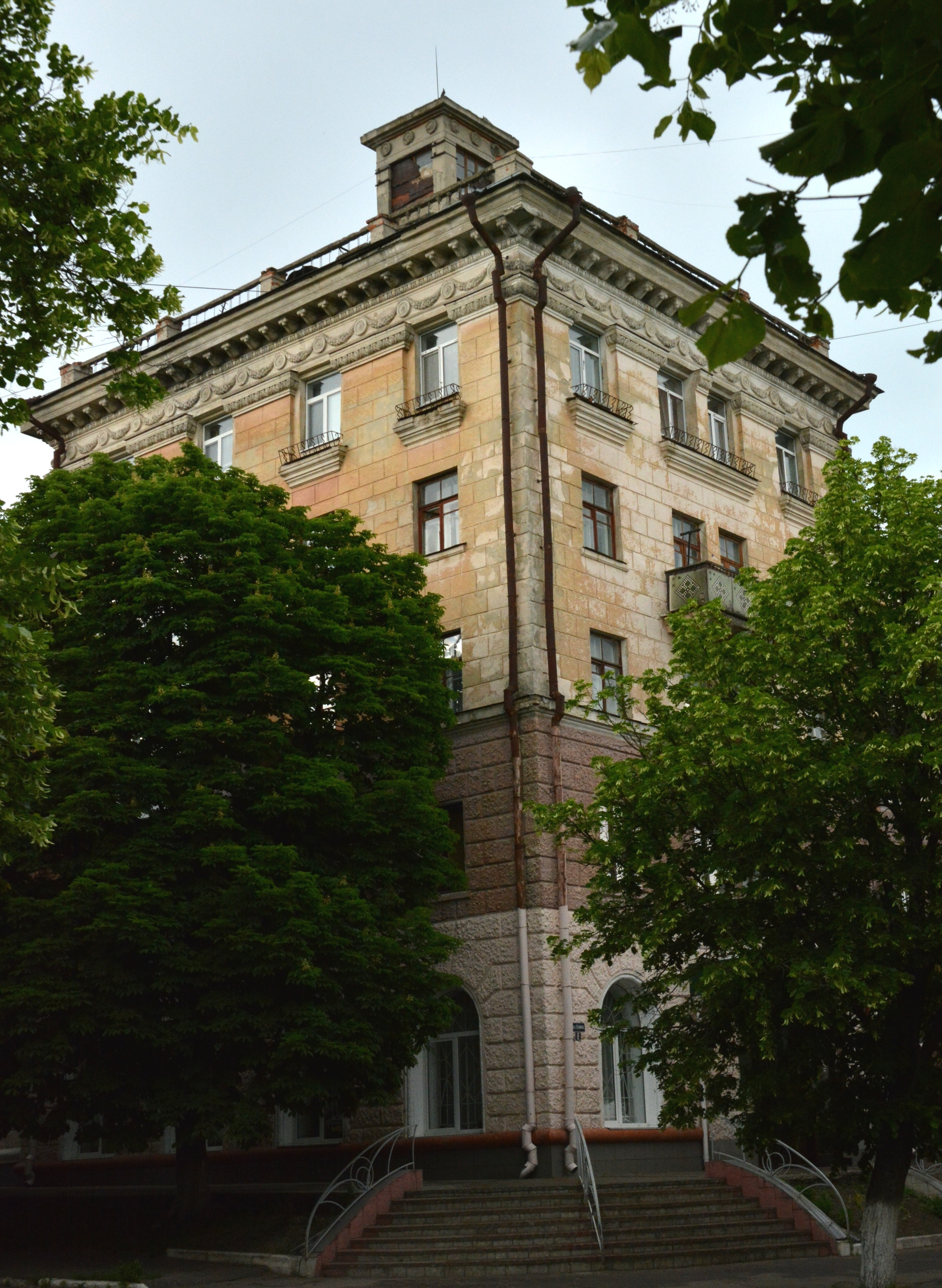 Житловий будинок (мур.), Конотоп, пр-т Леніна, 8